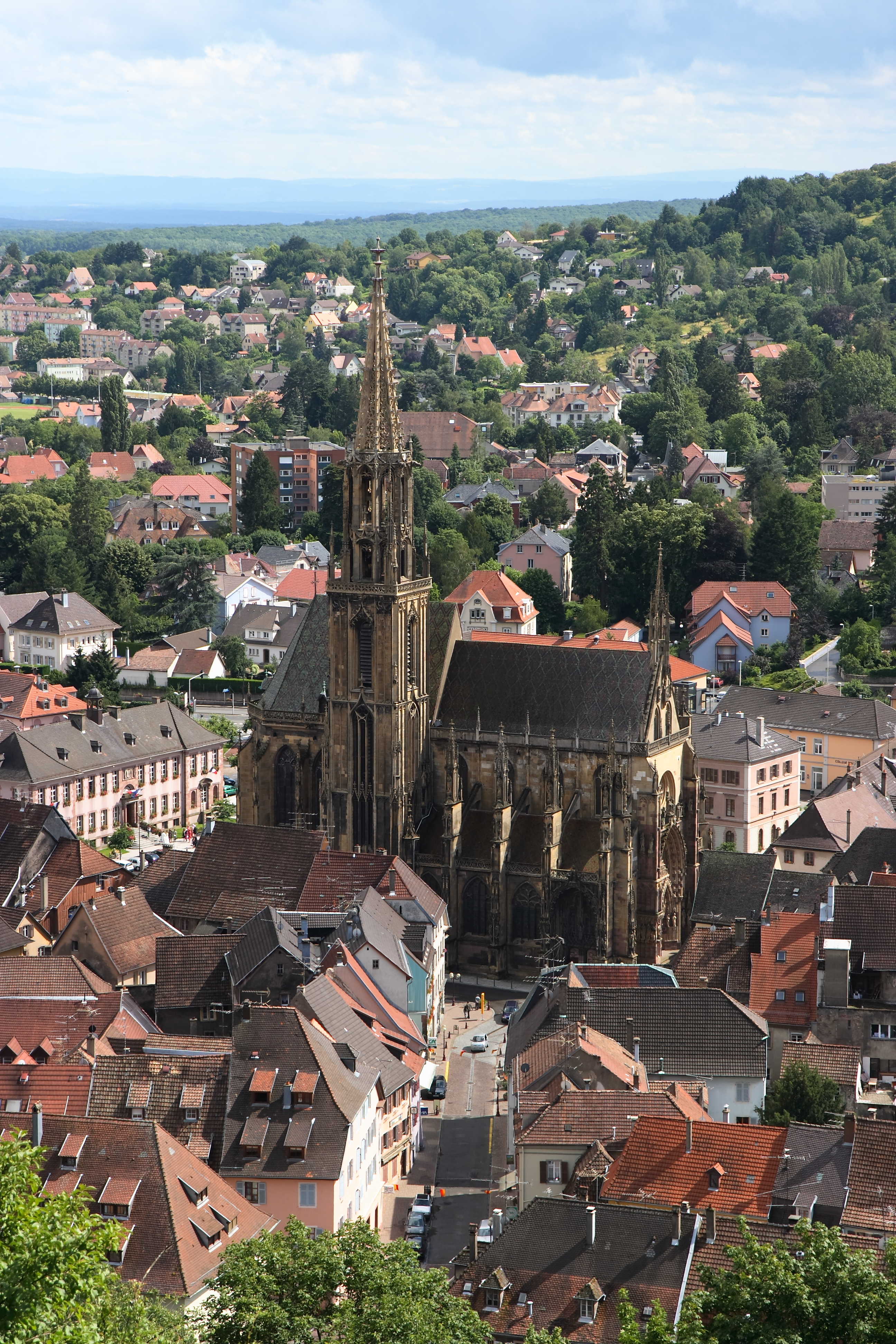 La Collégiale de Thann vue de l'Oeil de la Sorcière